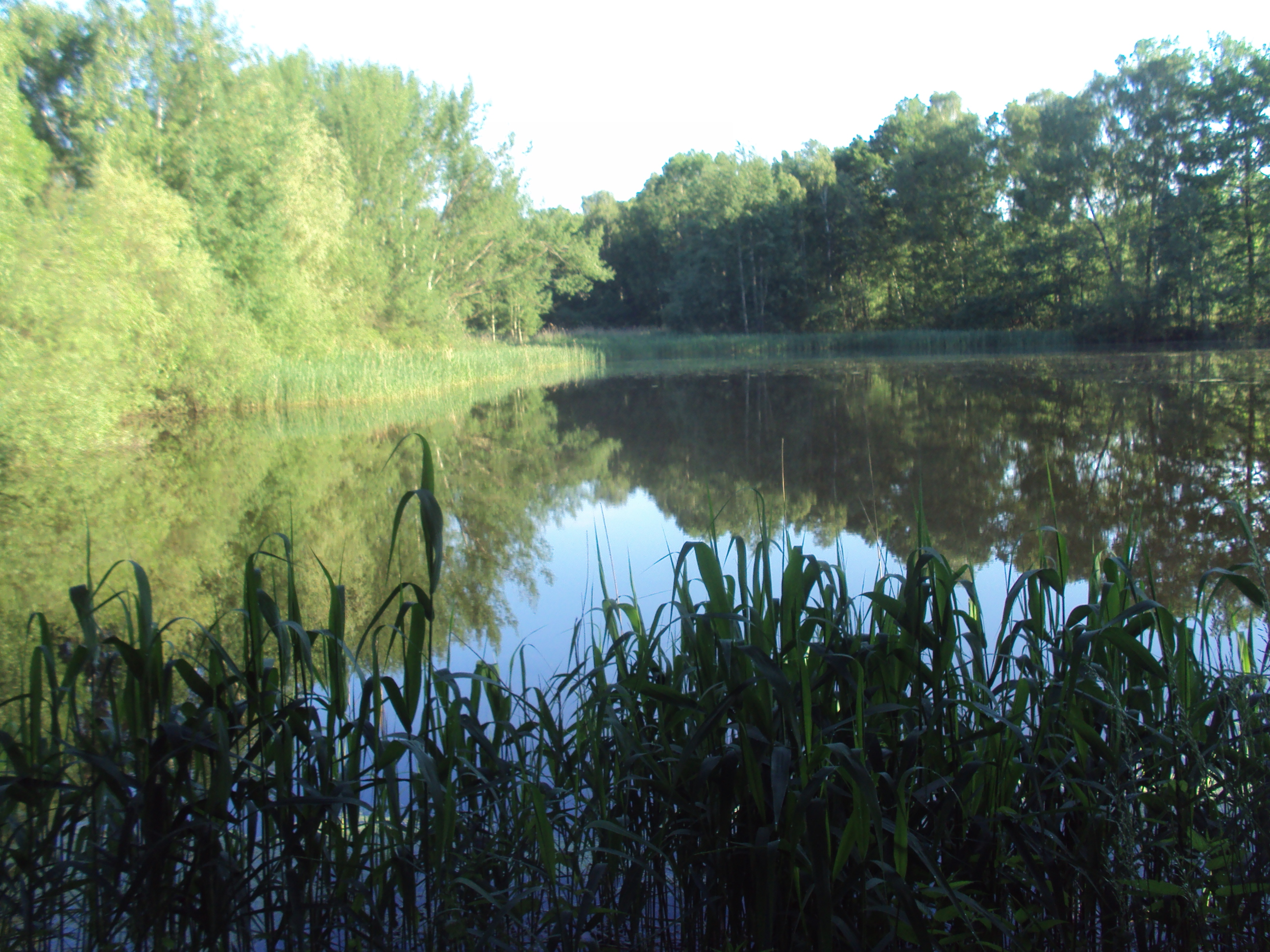 Česky: Malý Široký rybník je součástí PP Manušické rybníky